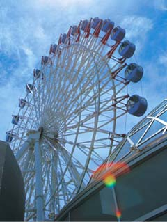 いよてつ髙島屋（愛媛県松山市）の屋上に設置された観覧車